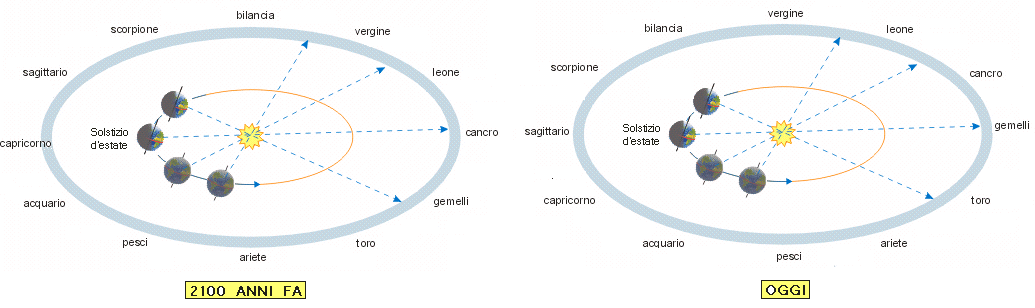 Spostamento dei segni zodiacali a seguito della precessione degli equinozi